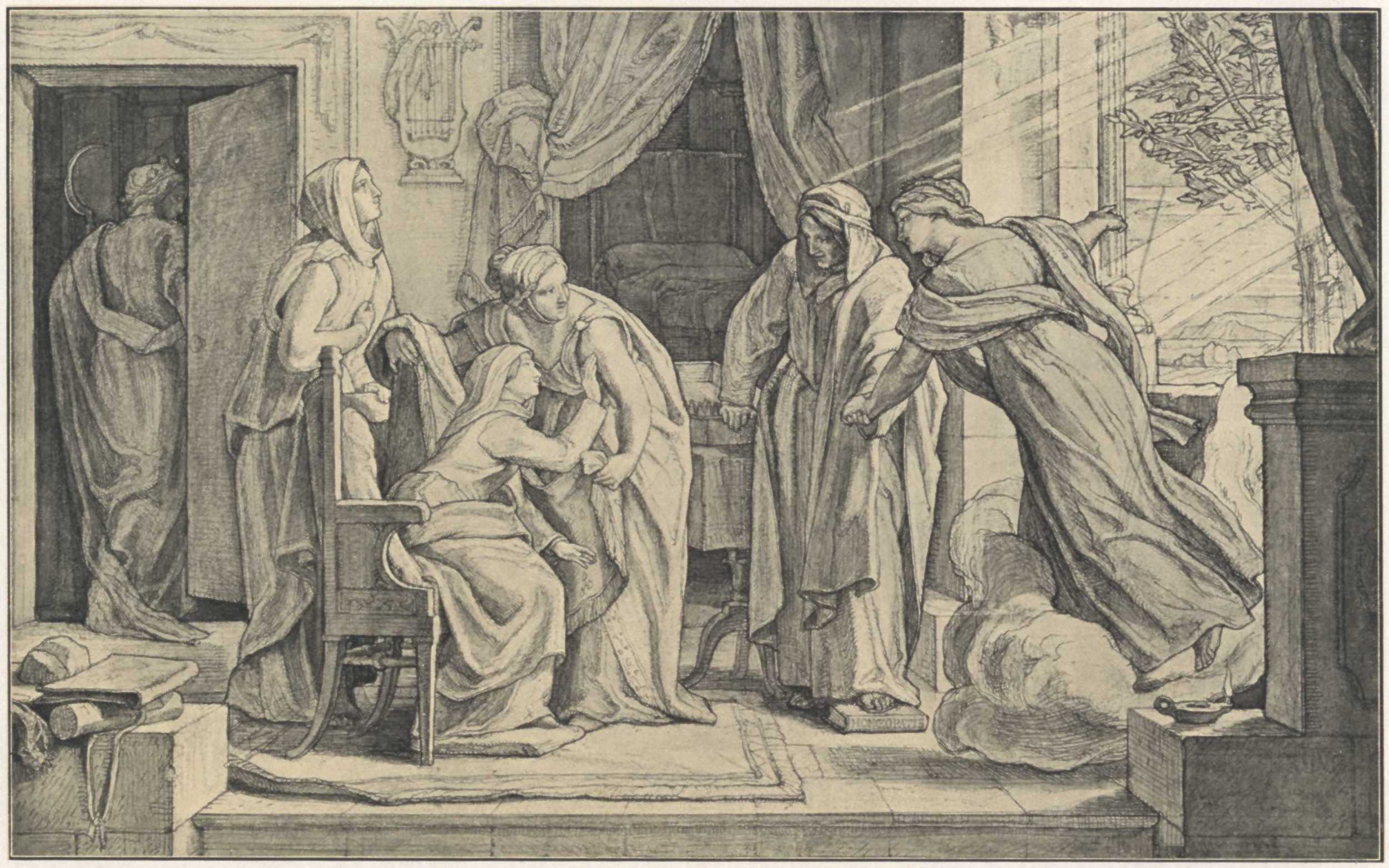 Genesung (lt. Quelle) Bildbeschreibung im Artikel Alfred Rethel in der ADB: Inmitten seiner schöpferischen, den Geist anspannenden Thätigkeit hatte den Künstler in den letzten Jahren eine große Sehnsucht nach der Gründung eines eigenen Heims ergriffen. . . . . , als die Seinigen im J. 1850 plötzlich die Nachricht von seiner Verlobung mit Fräulein Marie Grahl in Dresden auf das freudigste überraschte. Die ganze Familie athmete jubelnd auf, man hoffte auf ein ungetrübtes Glück. . . . Im October desselben Jahres fand die Hochzeit statt. Nach kurzer Zeit verfiel die junge Frau in ein schweres typhöses Fieber, das sie dem Grabe nahe brachte. . . . Doch sie genas und er feierte ihre Genesung durch eine tief empfundene, von ernster Schönheit durchhauchte Composition (1852), in der namentlich die Sorge und Pflege, sowie der innige Dank über das wiedergewonnene Leben der Theuern in unmittelbar ergreifenden Idealfiguren verkörpert ist.